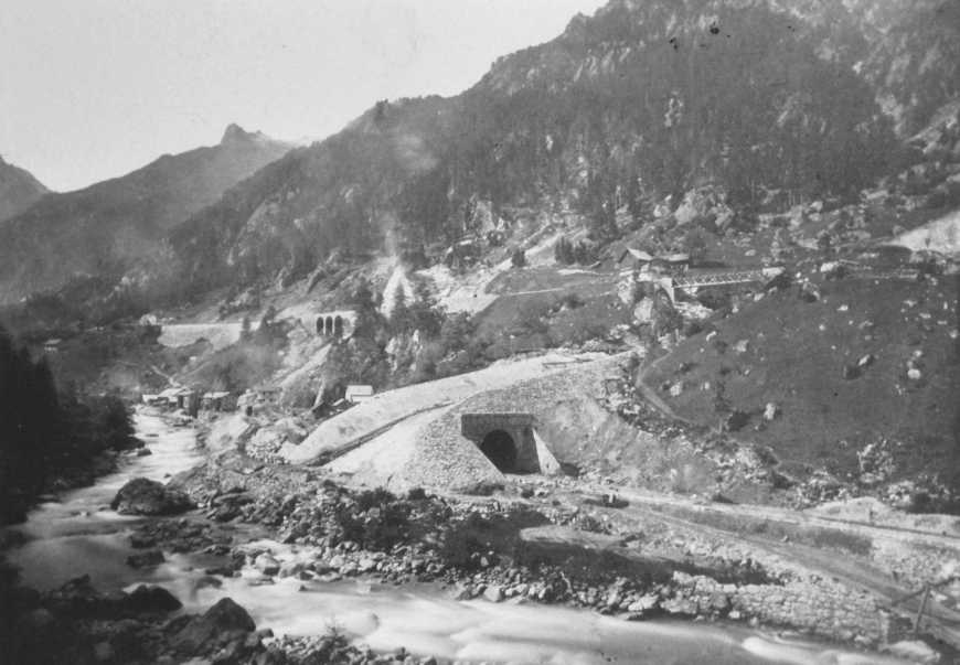 Die Strecke der Gotthardbahn (GB) unterhalb Wassen geht 1882 ihrer Vollendung entgegen. Das Gleis liegt noch nicht. Im Vordergrund die Häggrigergalerie zum Schutz vor Lawinen. Das höher liegende Gleis wird durch die Häggriger-Brücke über das Lawinental hinweggeführt.